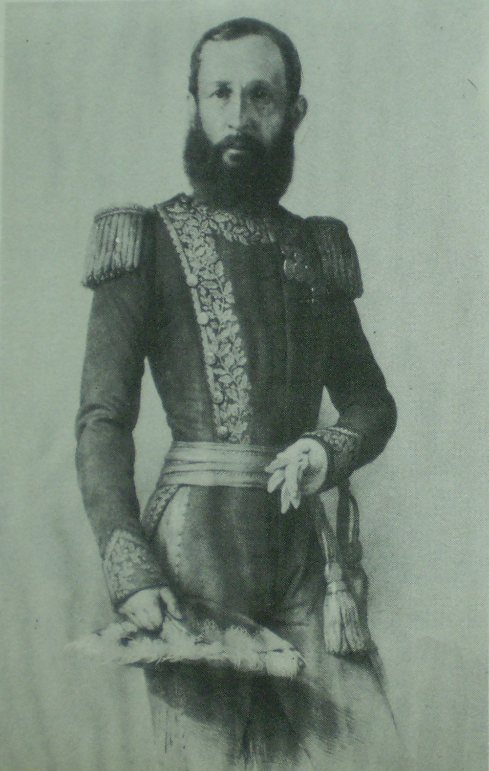 Reproducción fotográfica de Eugenio Garzón sobre un dibujo de León Nöel, aparecido en litografía de Lemercier de París. 1851.